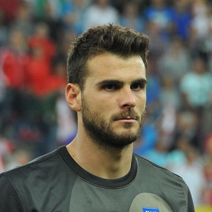 Freundschaftliches Länderspiel Österreich - Griechenland am 14. August 2013 in Salzburg: Orestis Karnezis